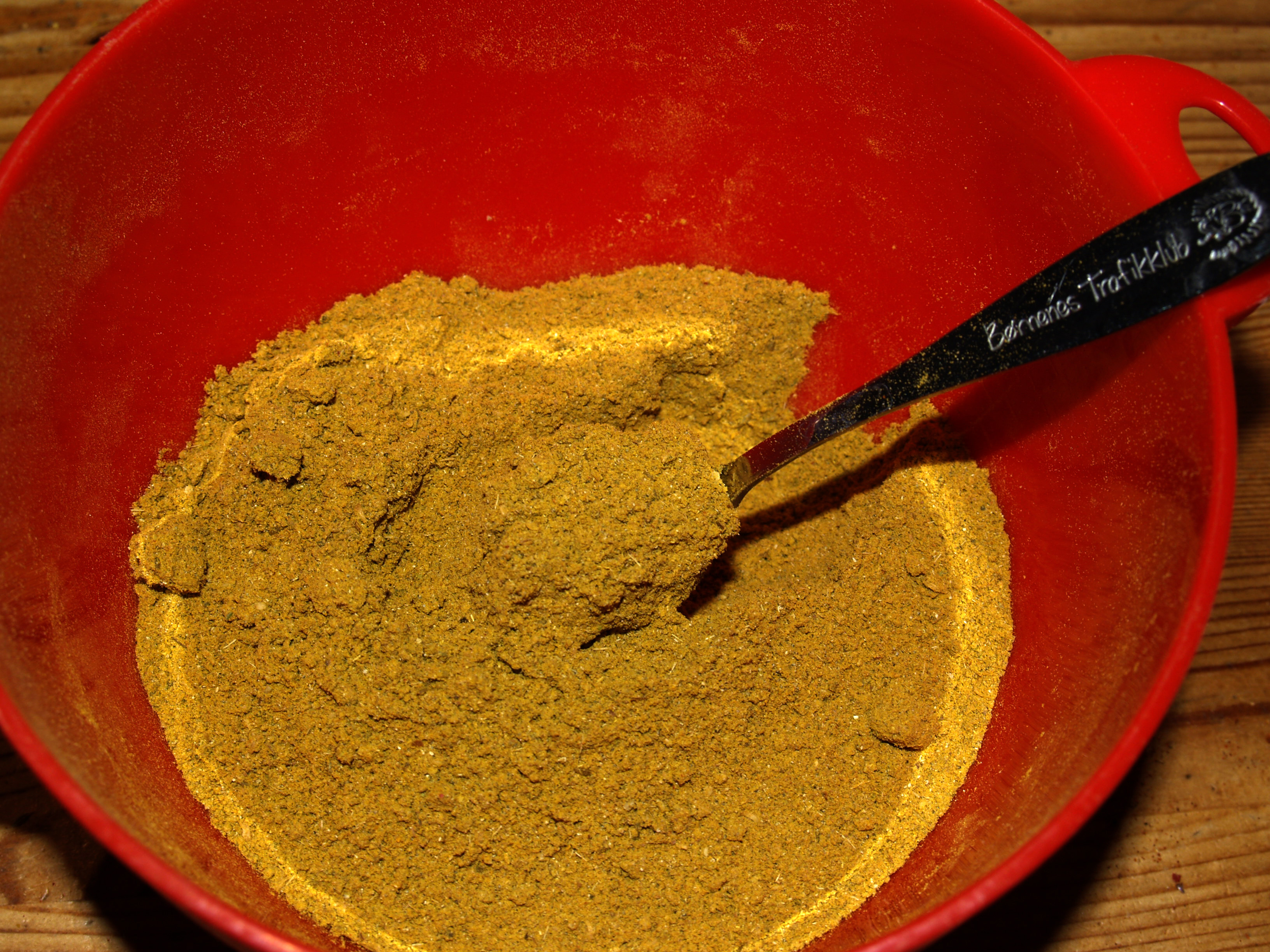 Hjemmelavet karry